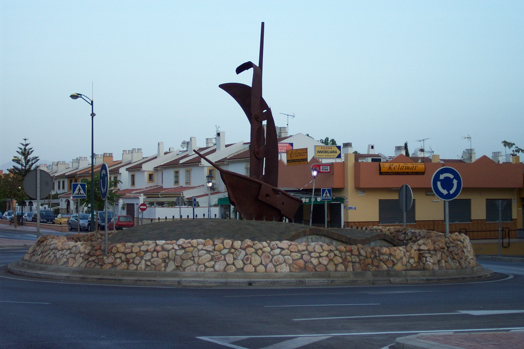 Alhaurín de la Torre, Spain.